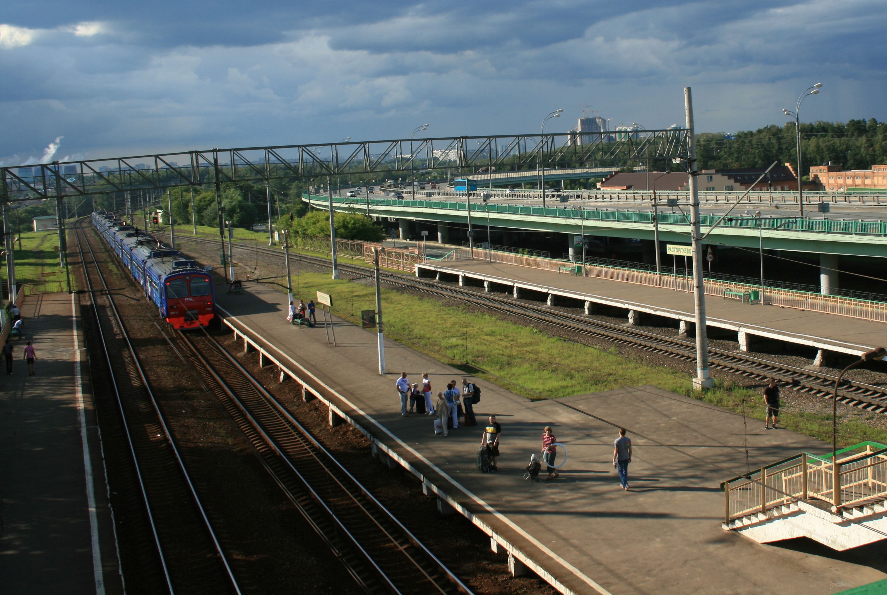 Эта платформа расположена в городе Видное